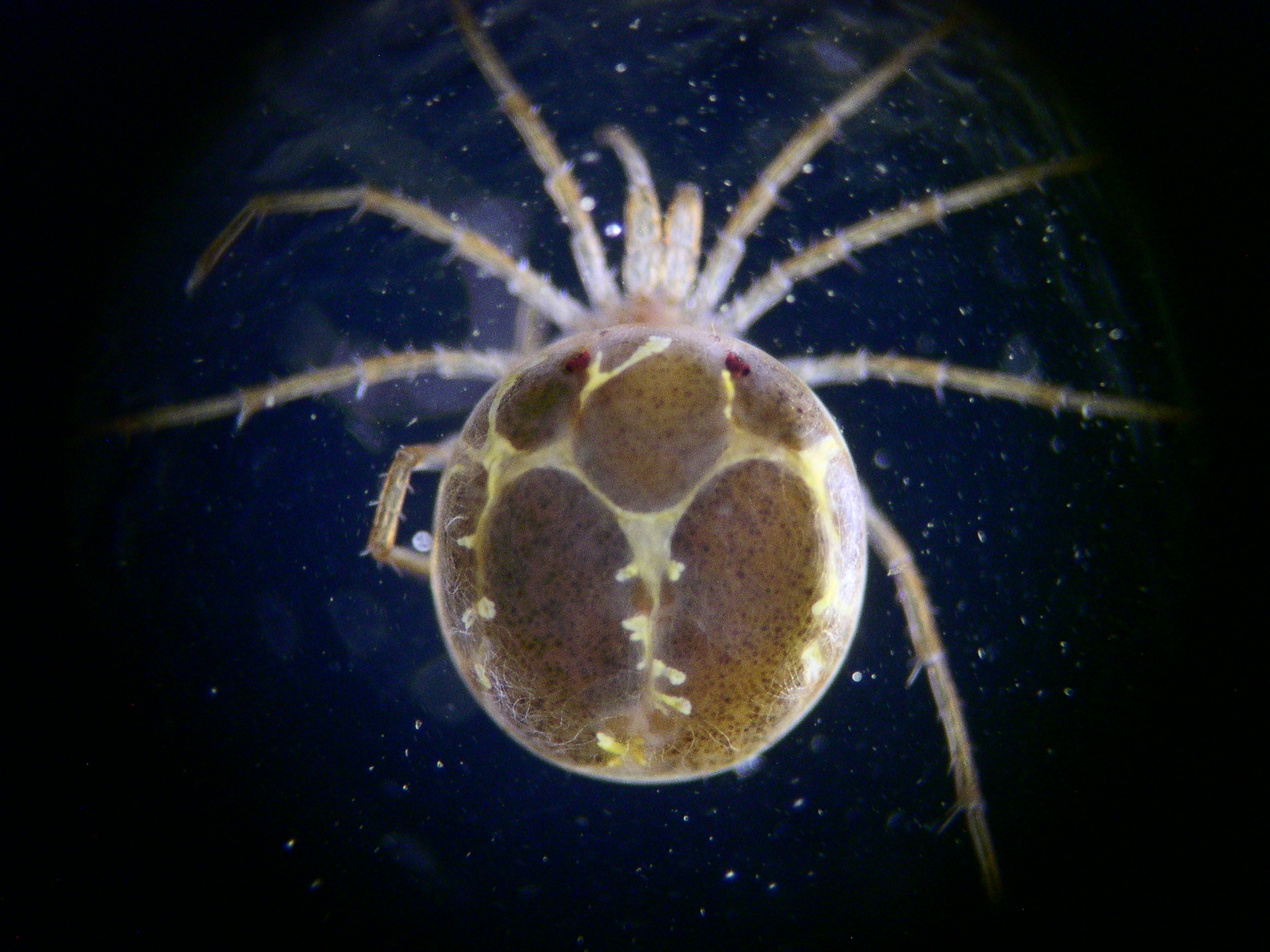 Weibchen von Hygrobates fluviatilis